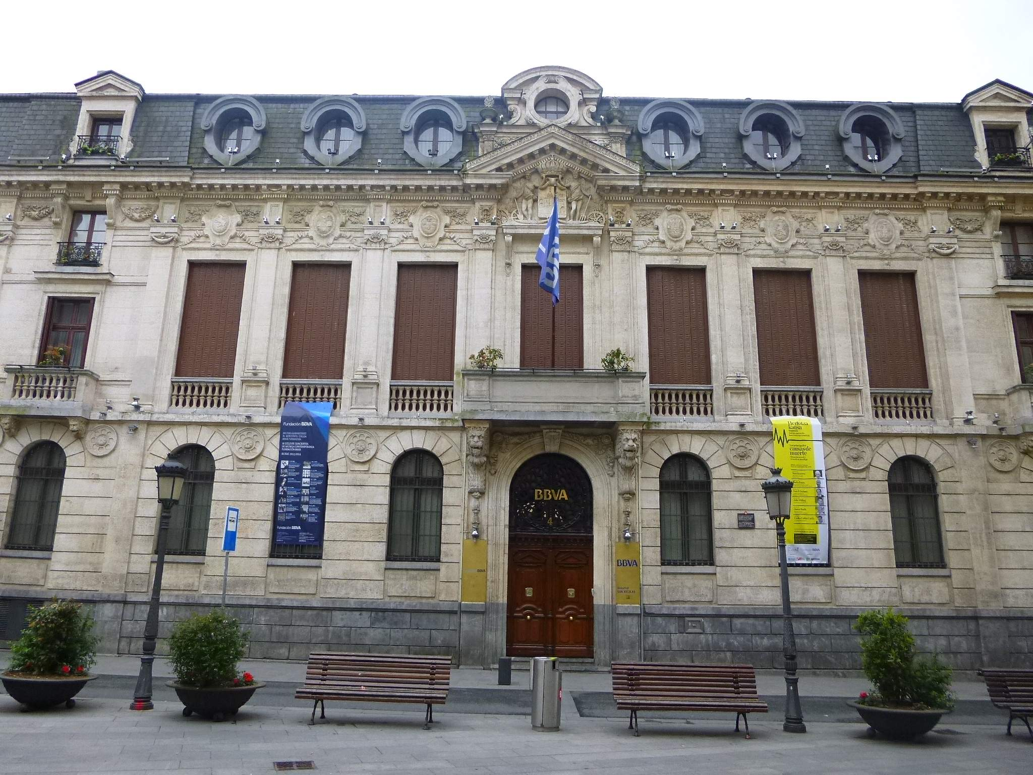 Primera sede en Bilbao del Banco de Bilbao